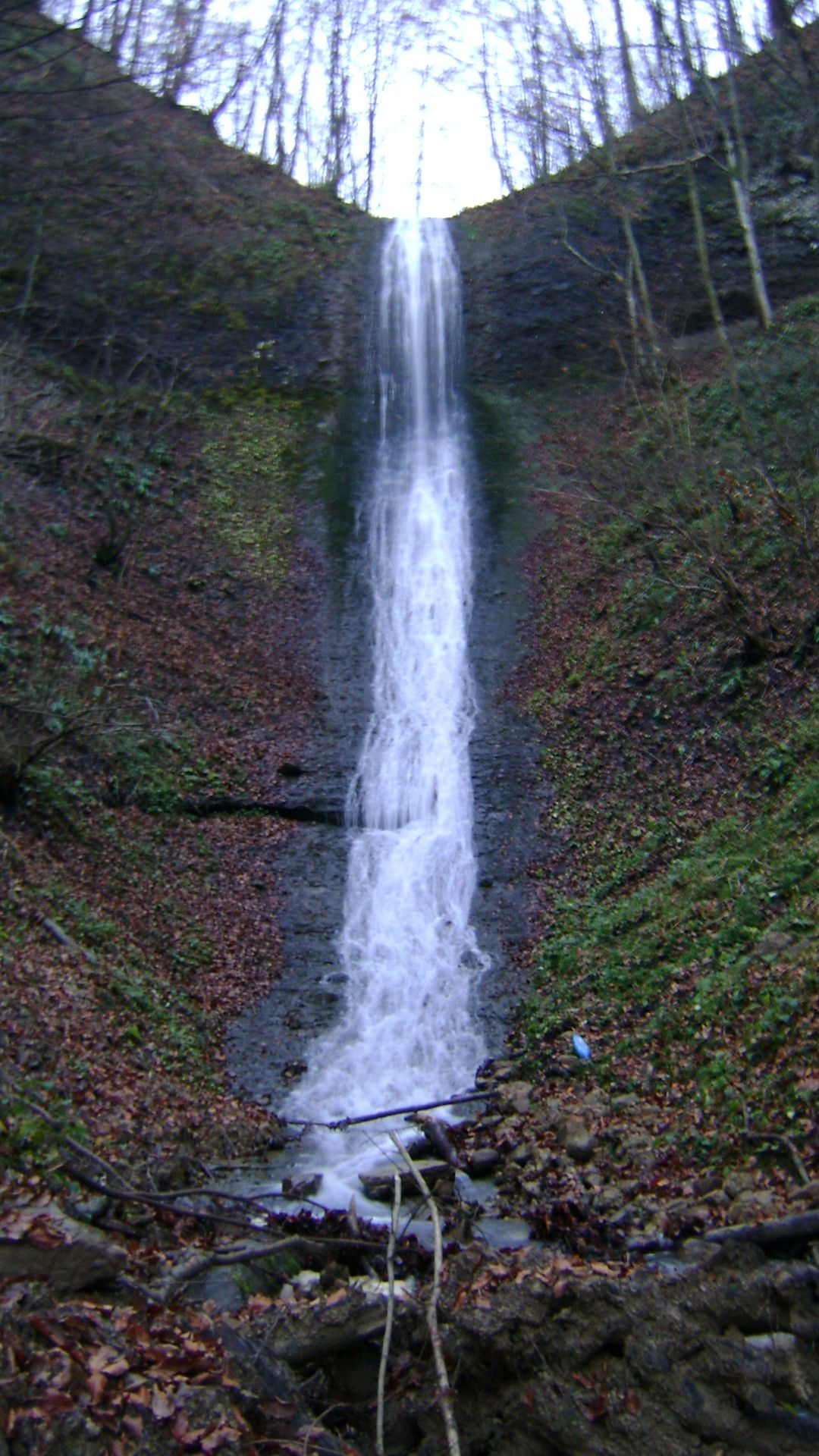 Vyshovatyj-vodospad.jpg: водоспад біля села Вишоватий (Тячівський район)